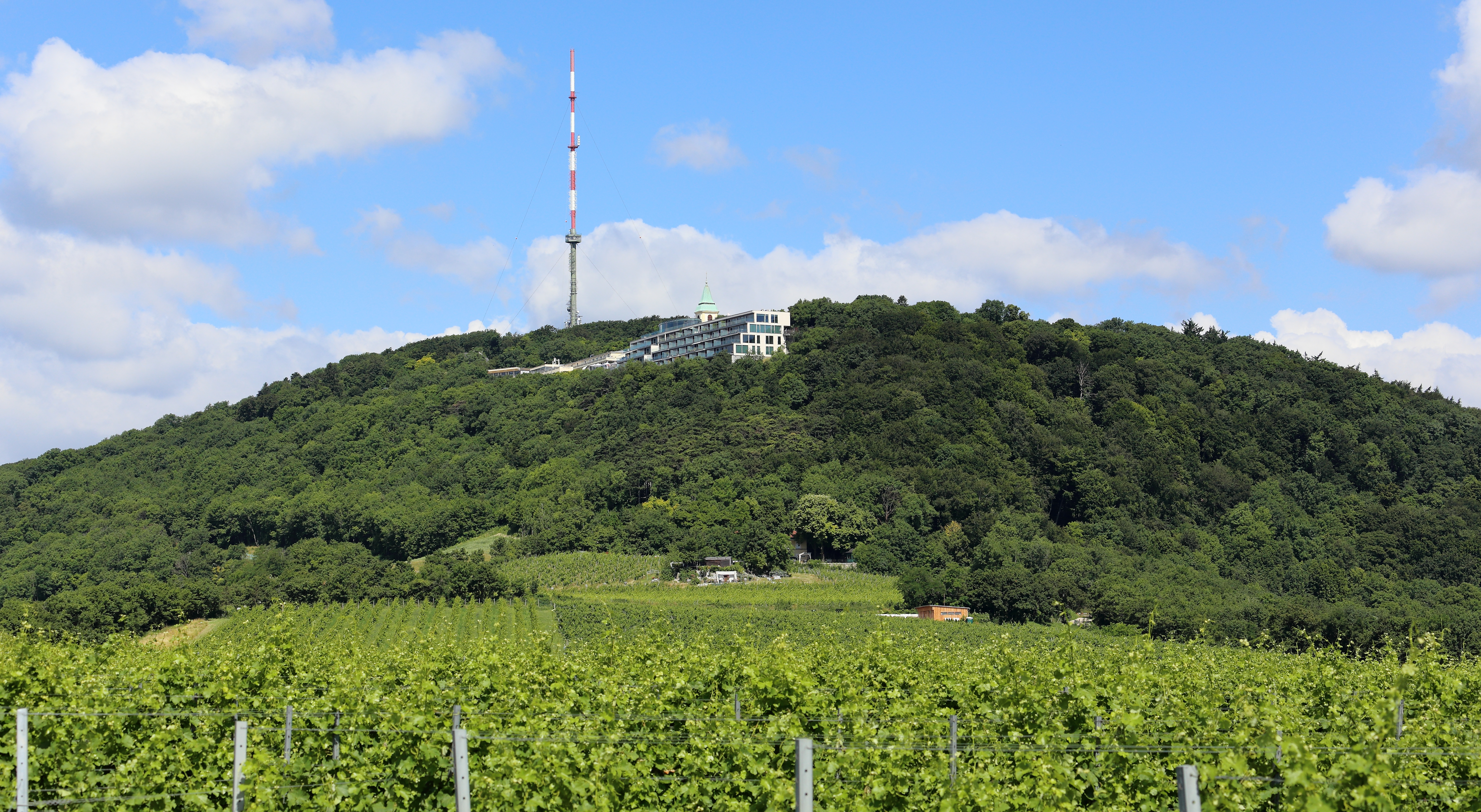 Südostansicht des 484 Meter hohen Kahlenberges im 19. Wiener Gemeindebezirk Döbling. Unterhalb des 165 Meter hohen und 1974 errichteten Mastes des Senders Kahlenberg von links nach rechts: Die Modul University Vienna (Start mit Wintersemester 2007/2008), das Suite'Hotel und das Austria Trend Hotel Kahlenberg mit Luxus-Suiten sowie "Langzeitaufenthalte"-Arpartments (Fertigstellung 2007) und dahinter der Kirchturm der Josefskirche.